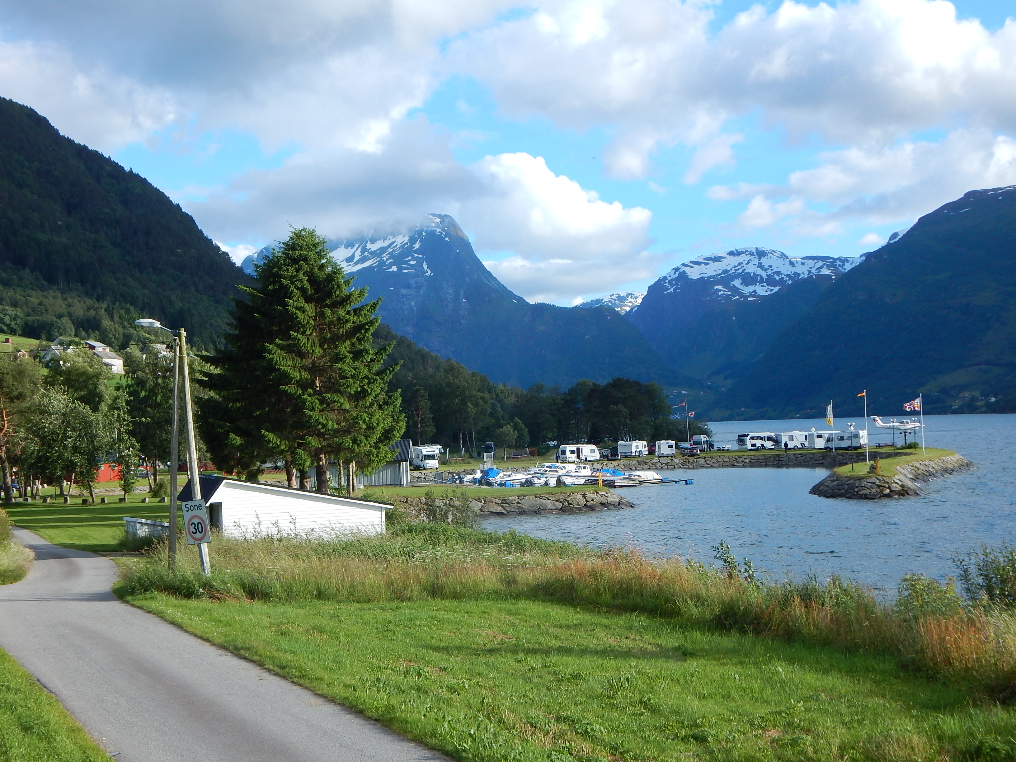 Reed camping